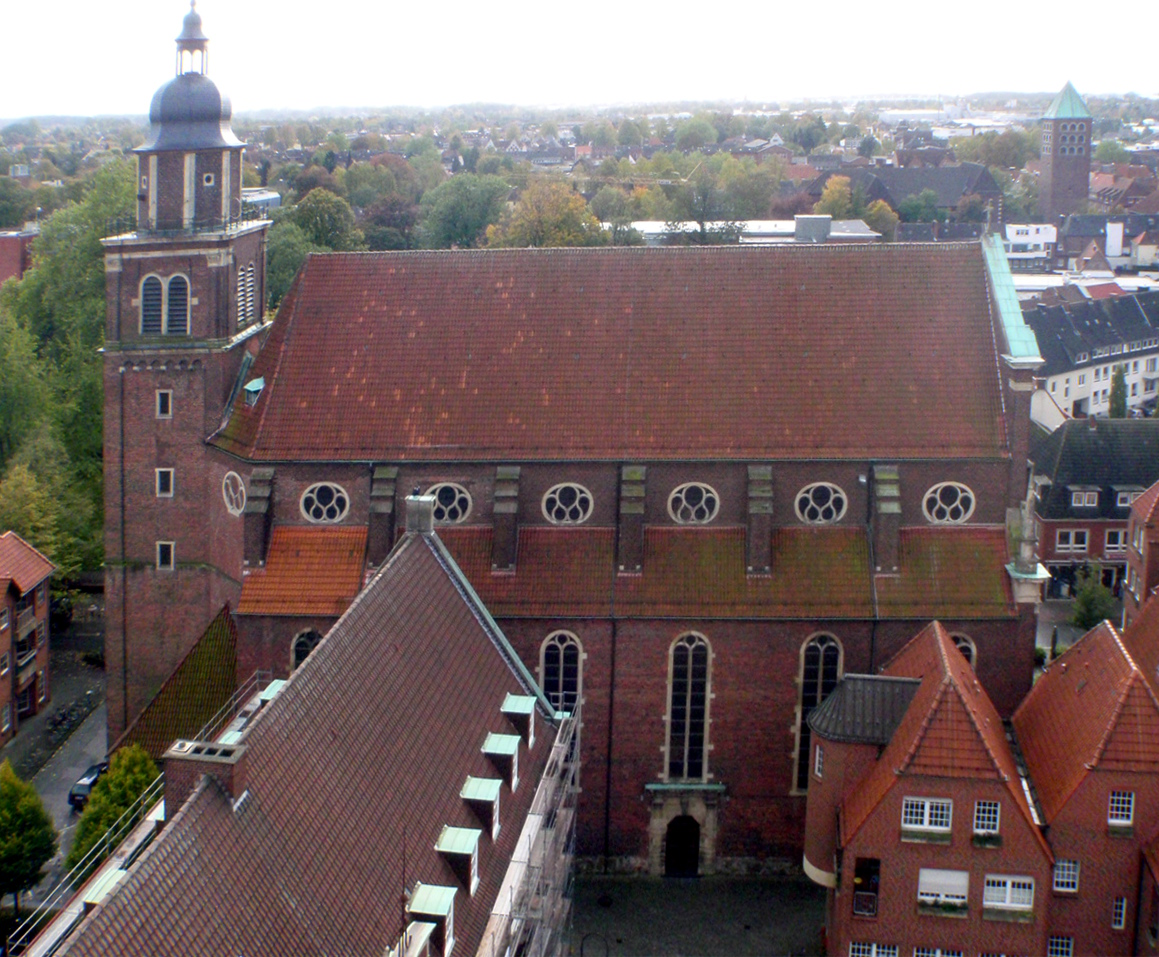 Die Jesuitenkirche in Coesfeld gesehen vom Turm der Lambertikirche.